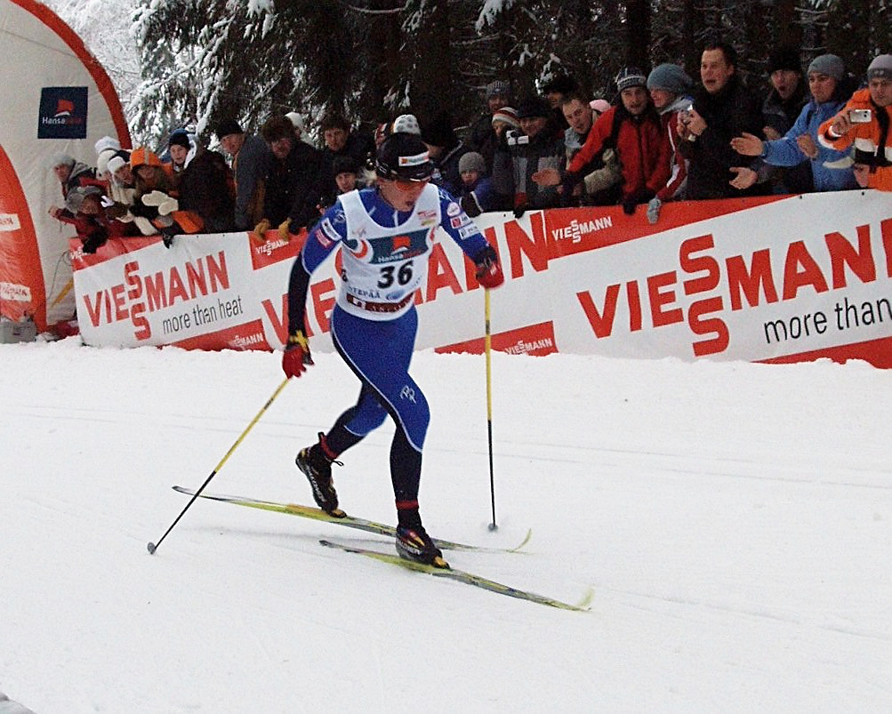 Kristina Šmigun Otepää MK etapil 2006. aastal